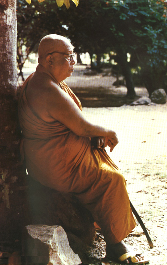 Ajarn Buddhadasa Bhikkhu, Thai Theravada Monk, Wat Suan Mokkh, Southern Thailand